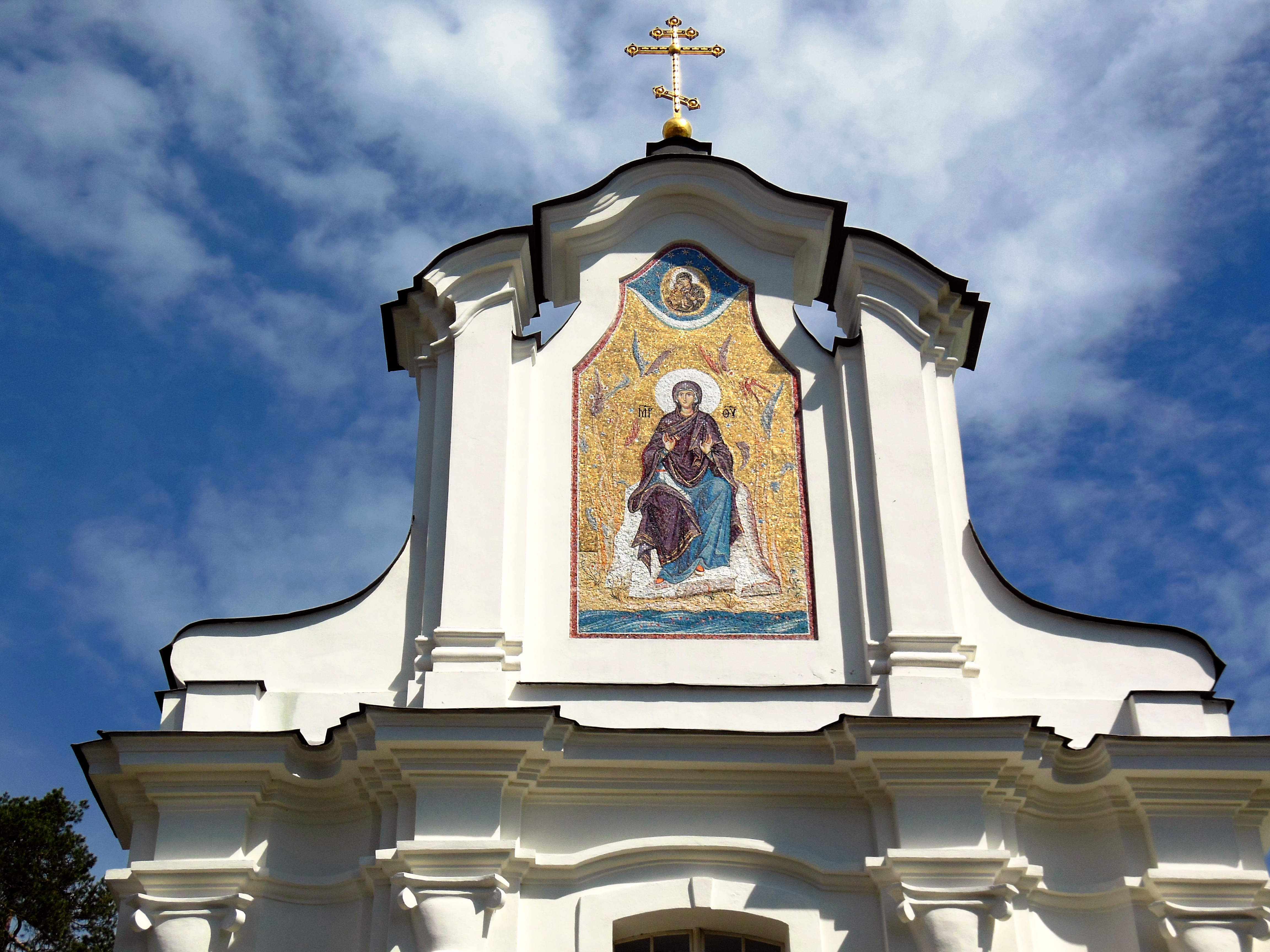 Беларуская (тарашкевіца): Ансамбаль Сьвята-Усьпенскага манастыра: Усьпенскі сабор дэкаратыўнае аздабленьне: росьпіс у консе «Спас Пантакратар», арнамэнтальны дэкор на скляпеньнях паўднёвай сакрысьціі і ўсіх нэфаў, іканастас, бакавыя алтары Богаяўленская царква Крыжаўзьвіжанская царква званіца будынак сэмінарыі жылы корпус гаспадарчыя пабудовы. в. Жыровічы This is a photo of Belarusian heritage monument. Reference number: 411Г000537 ( WLM)